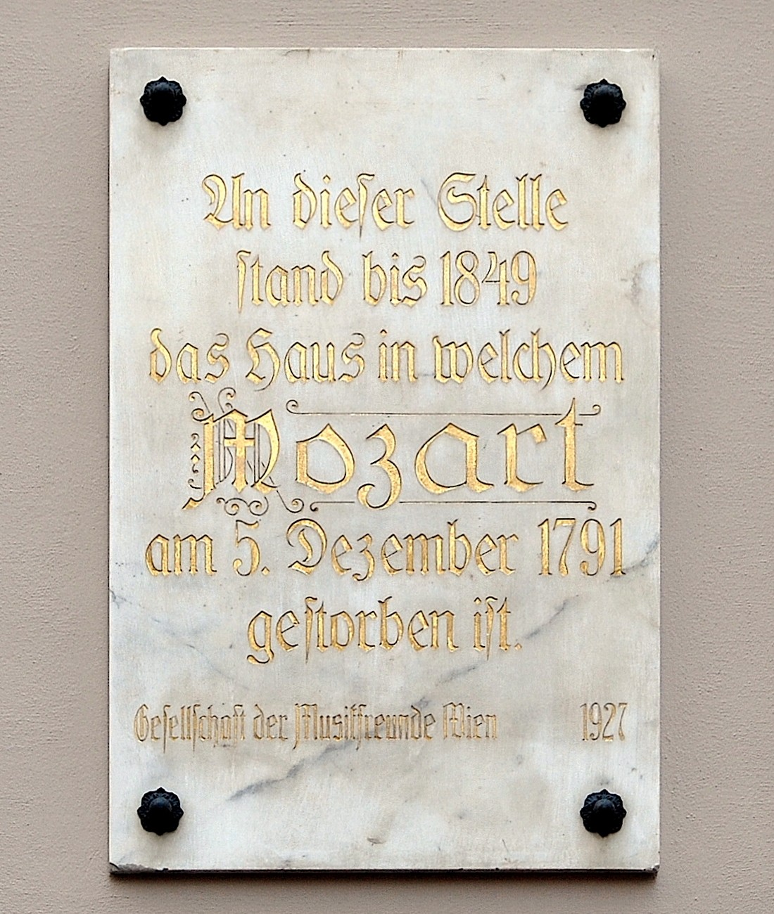 Mozartgedenktafel an der Rückseite des Kaufhauses Steffl in der Rauhensteingasse, 2012